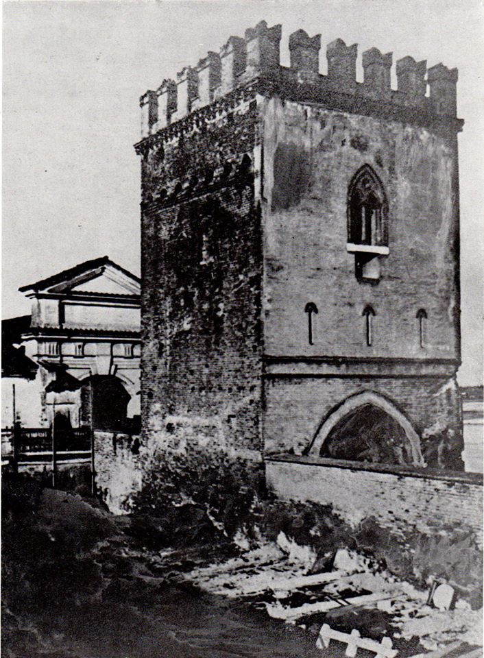 Porta-Torre del Ponte dei Mulini viene demolita nel 1905]